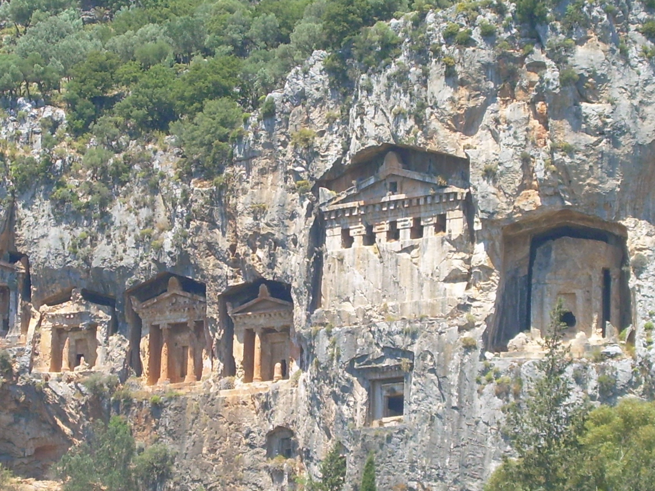 Kaunos'taki kral mezarları